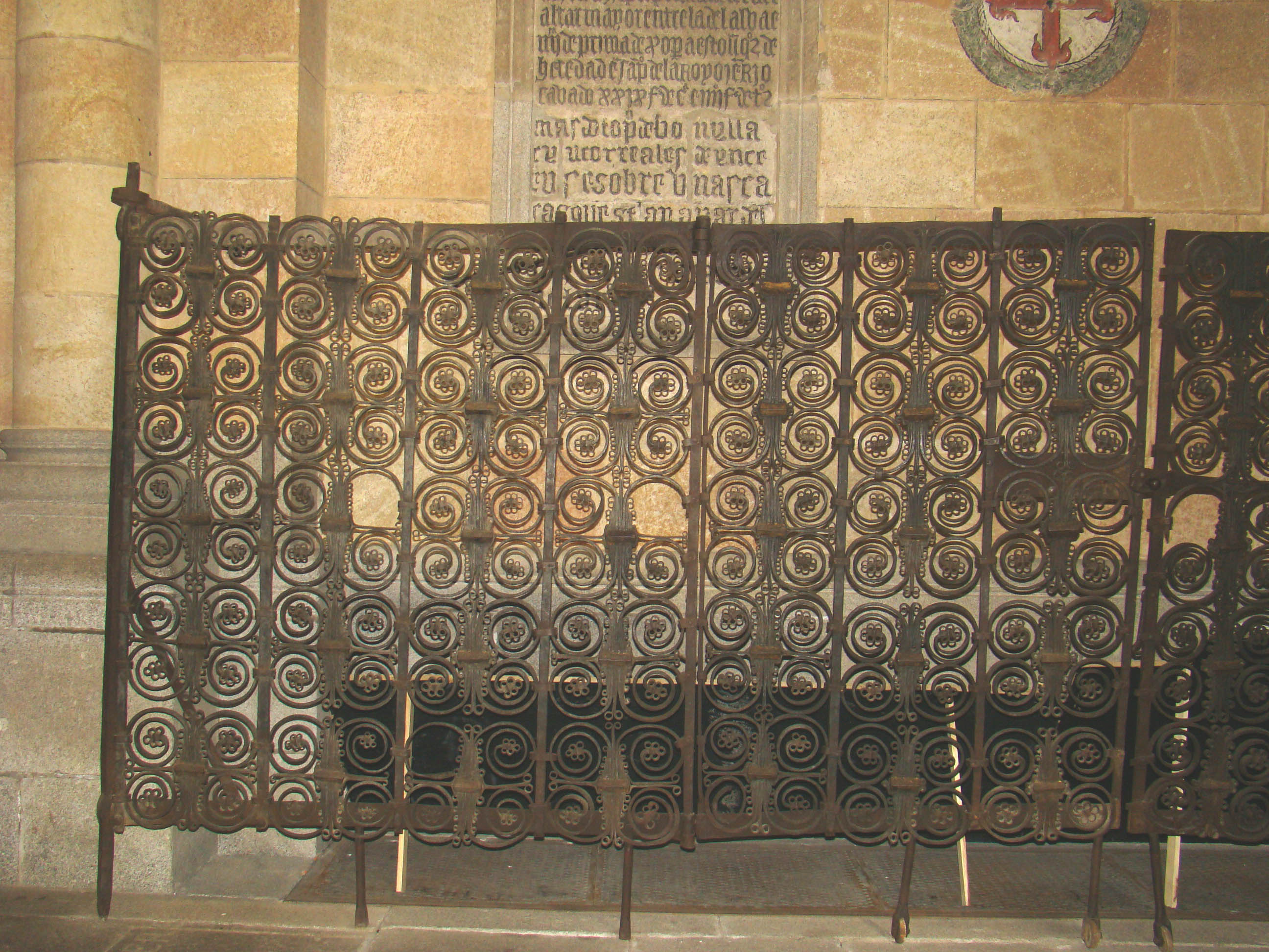 Reja románica de la basílica de San Vicente en Ávila (España).